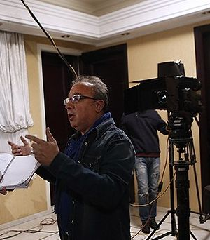 حسین سهیلی‌زاده - پشت صحنه مجموعه تلویزیونی آوای باران - دی ۱۳۹۲